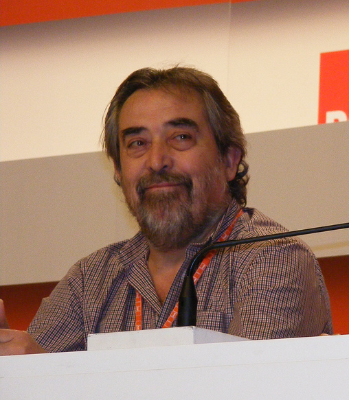 Juan Alberto Belloch y Aina Calvo en la Convención Municipal del PSOE celebrada en Sevilla el 12 de febrero de 2011